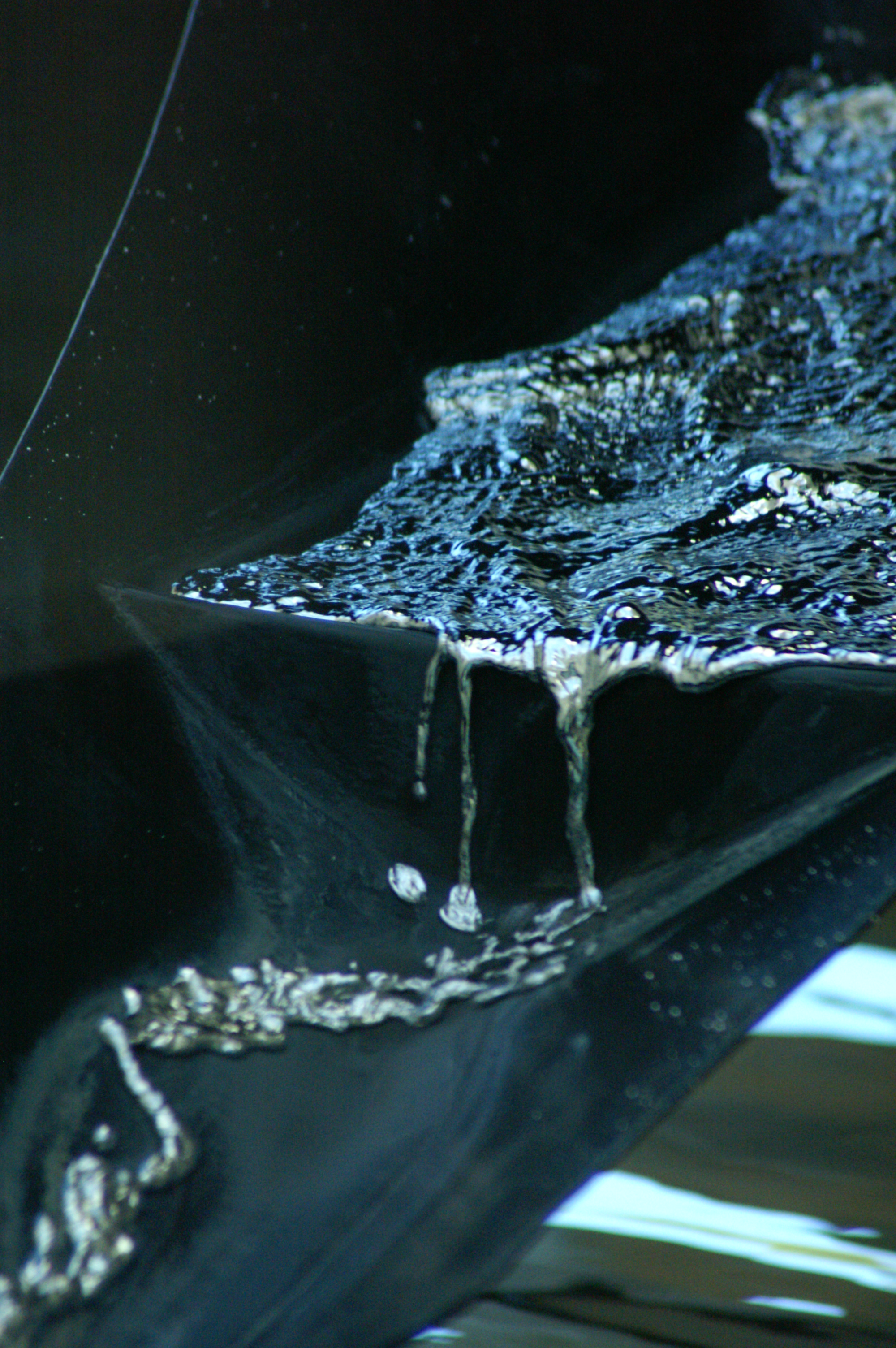 Fundacio Joan Miro, Barcelona